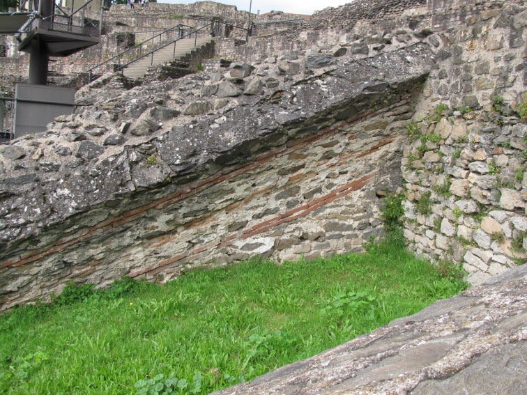 Lyon Théâtre romain de Fourvière. Départ d'une voûte supérieure soutenant la cavea, partie nord